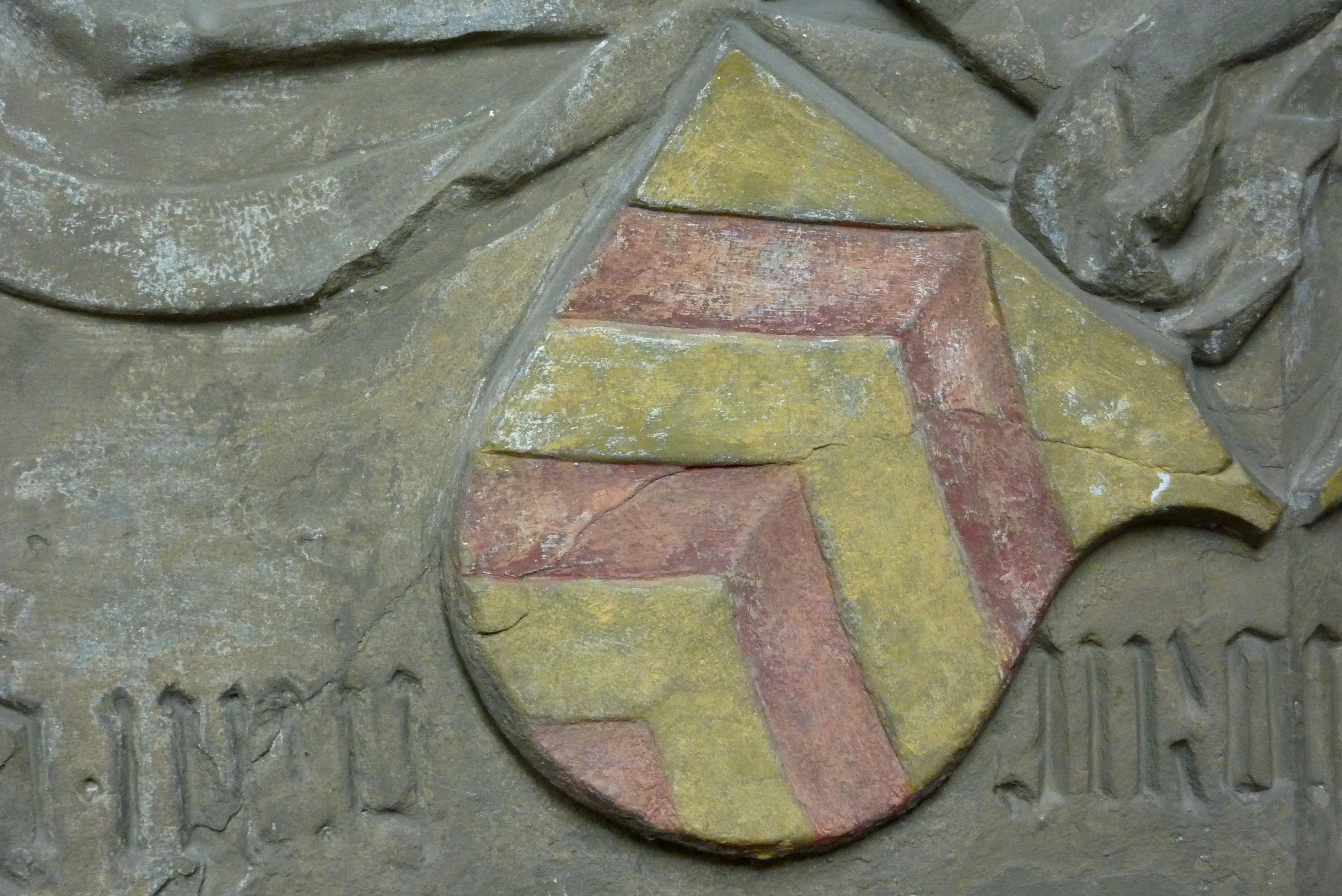 katholische Stadtpfarrkirche St. Peter und Paul in Grünsfeld im Main-Tauber-Kreis (Baden-Württemberg), Hauptstraße 18, Epitaph für Dorothea von Rieneck